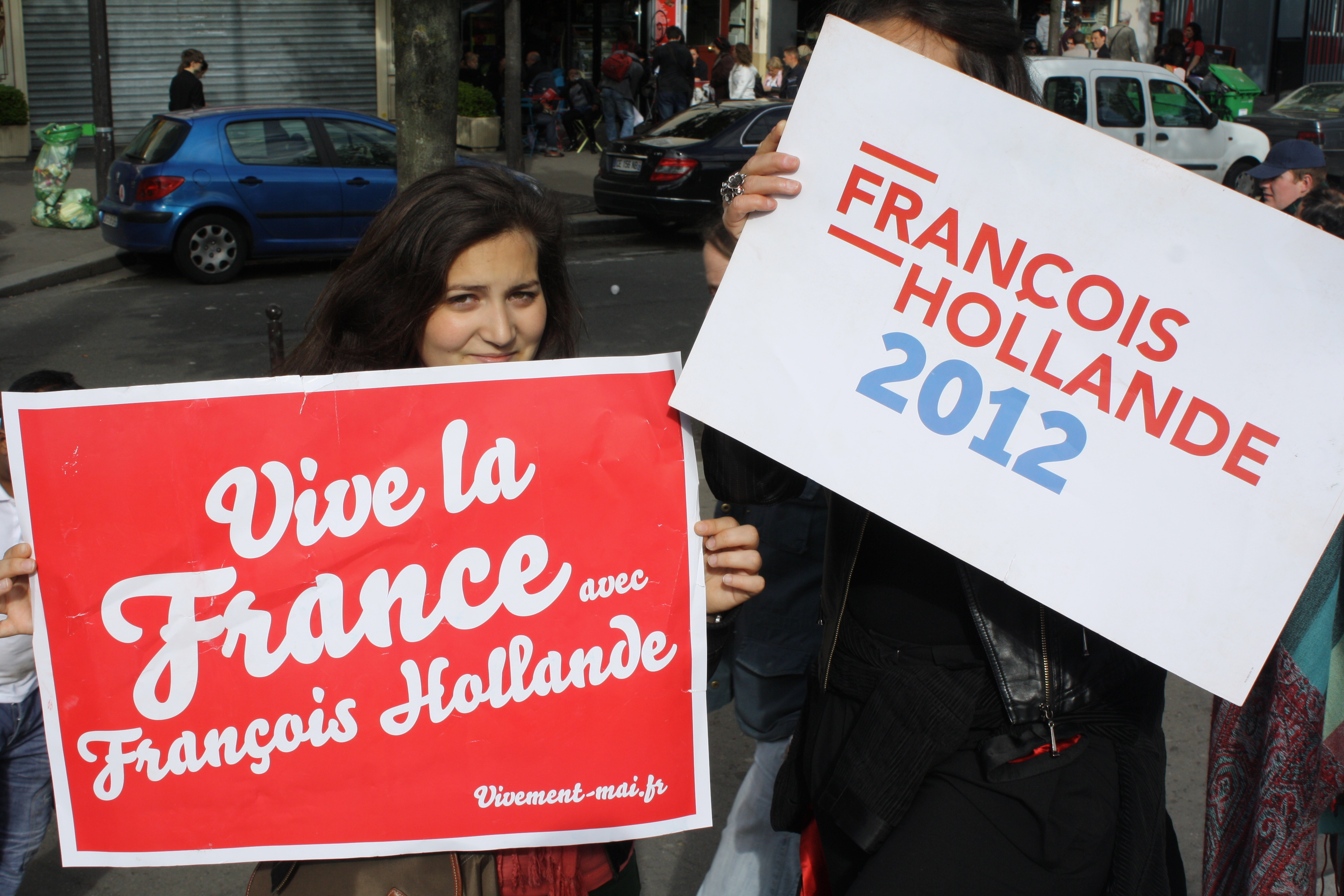 Dernier meeting parisien pour François Hollande une semaine avant le second tour de l'élection présidentielle, le 29 avril 2012, à Bercy. Quelques instantanés du côté des militants.